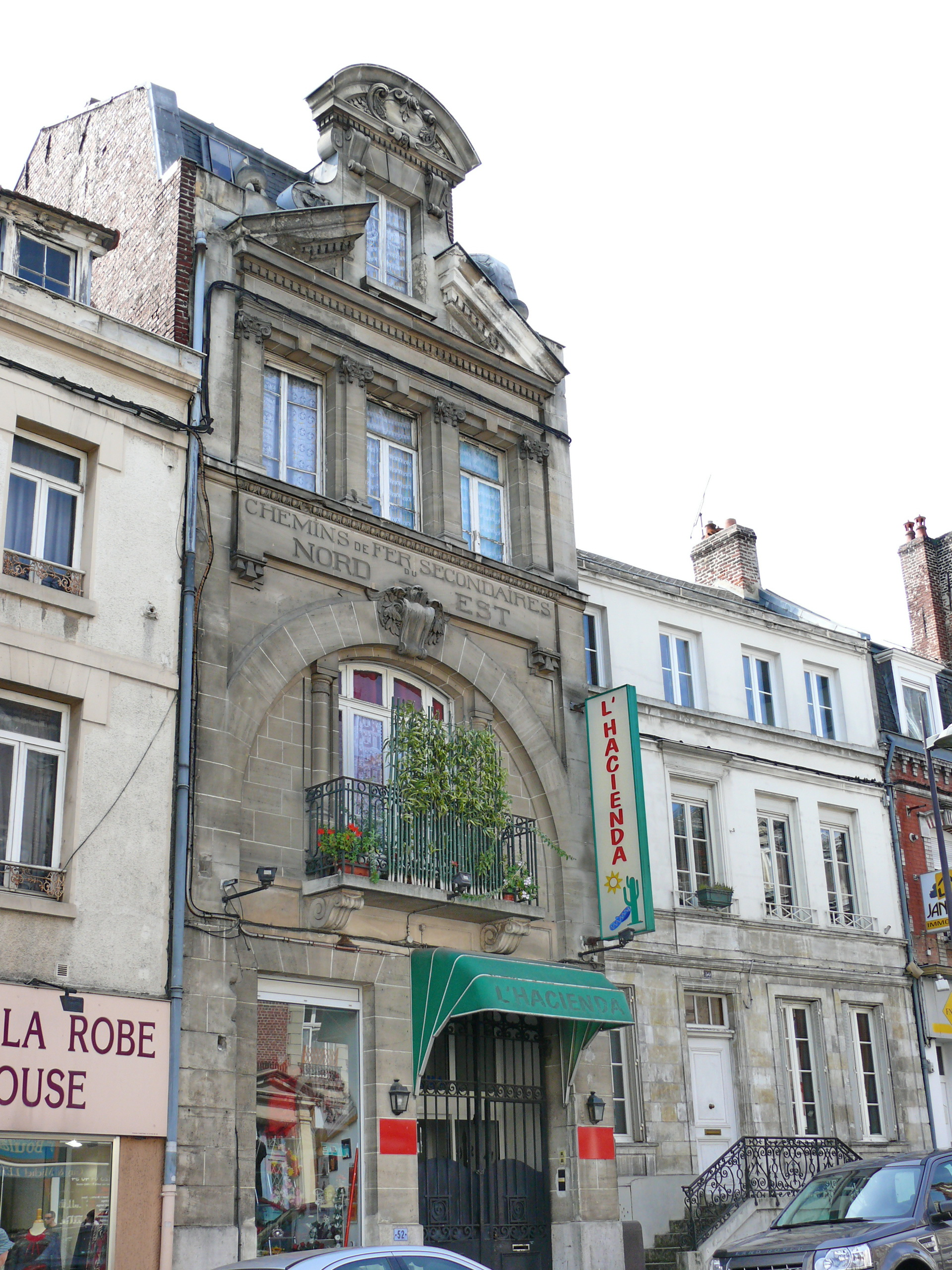 SAINT-QUENTIN : Le bâtiment de l'ancien siège de la Compagnie des chemins de fer secondaires du Nord-Est, rue d'Isle.